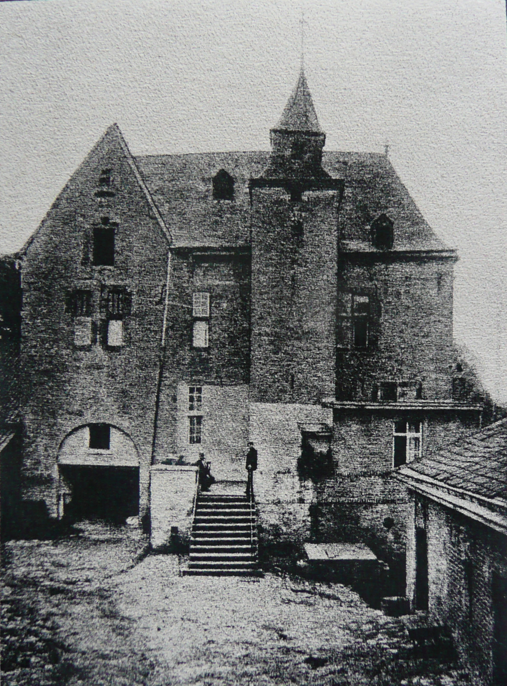 Großer Niersteiner Hof vor 1900